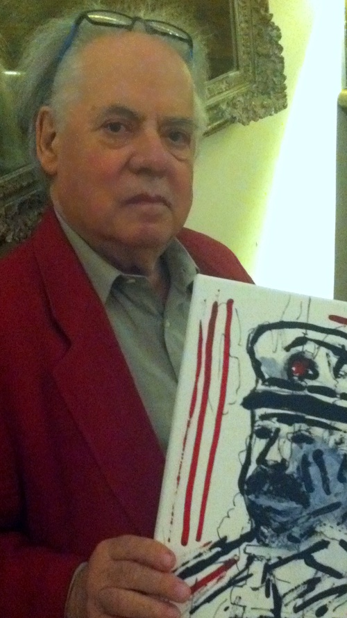 Aldo Bernardini con in mano un quadro di Stalin